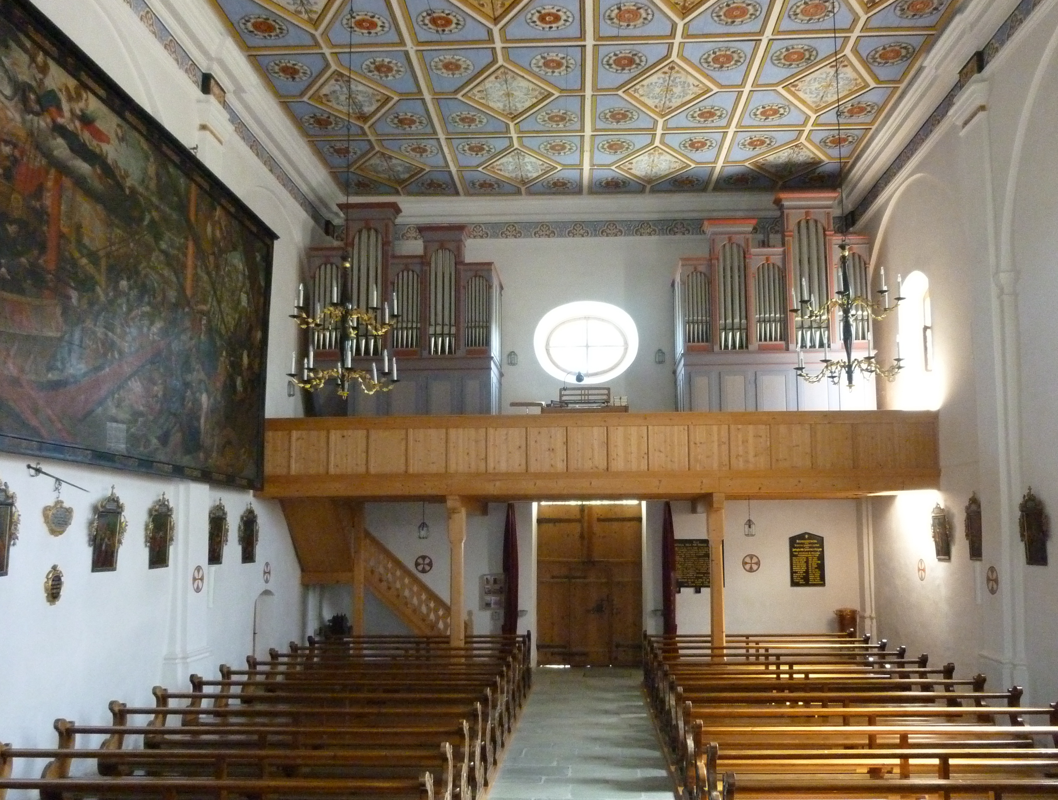 Katholische Kirche Pleif: Blick zur Empore